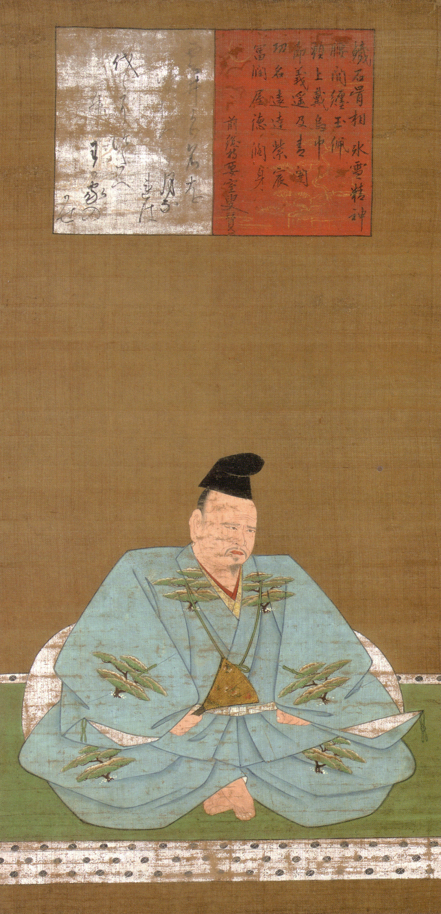 相良義滋像 （室町時代/16世紀作）